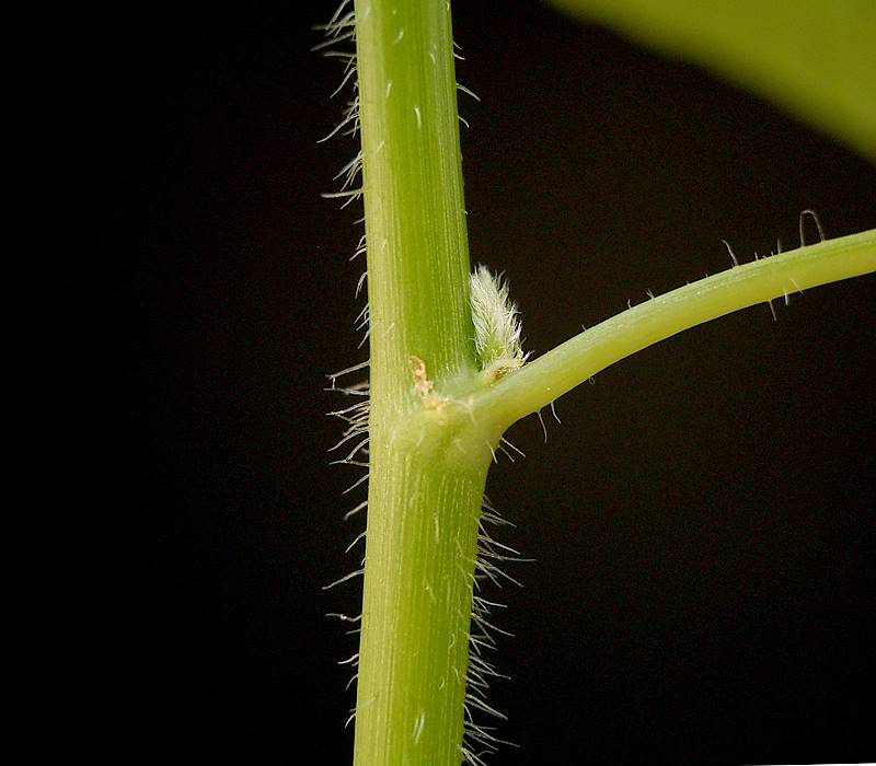 Euphorbia dentata